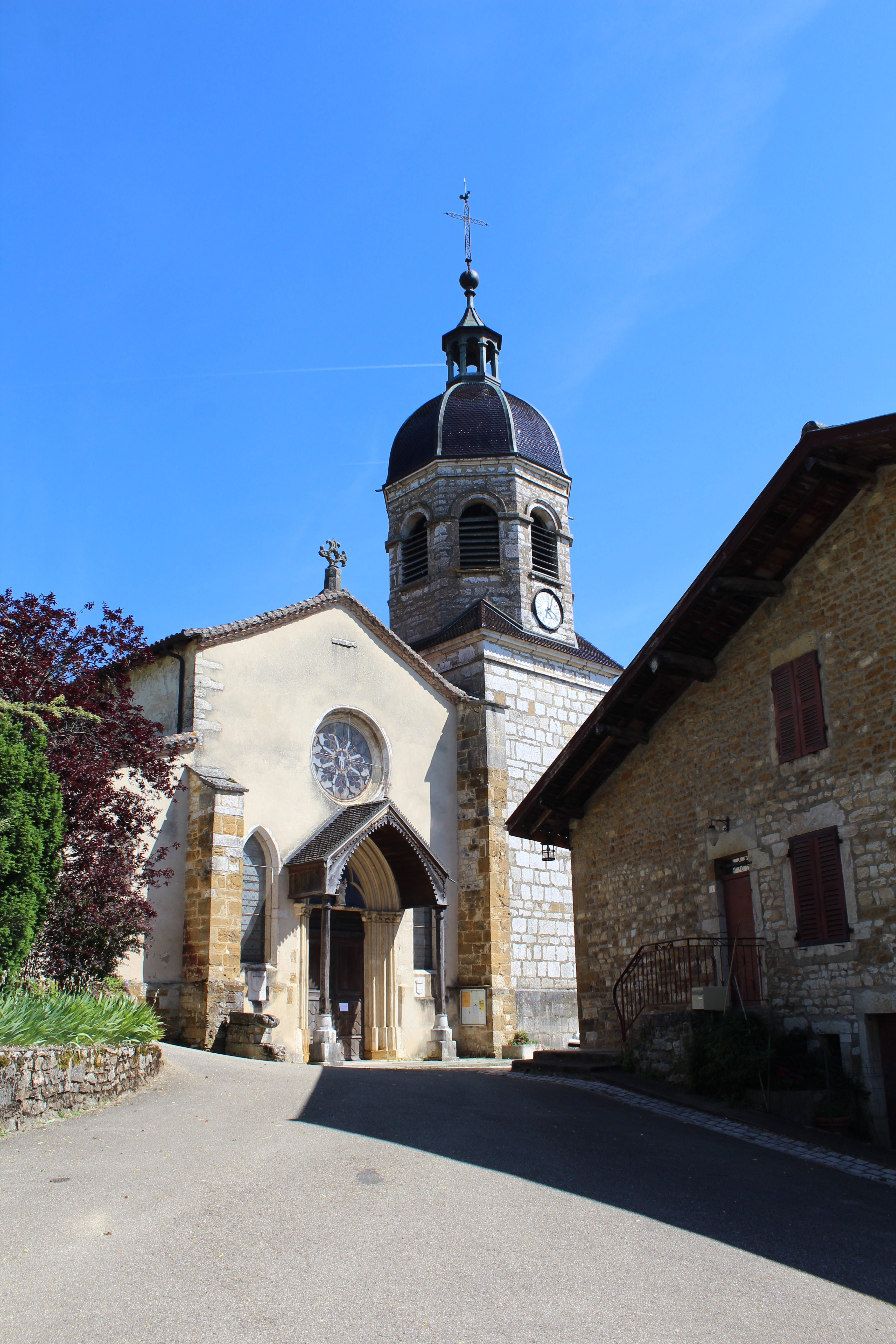 Église Notre-Dame-de l'Assomption de Treffort.